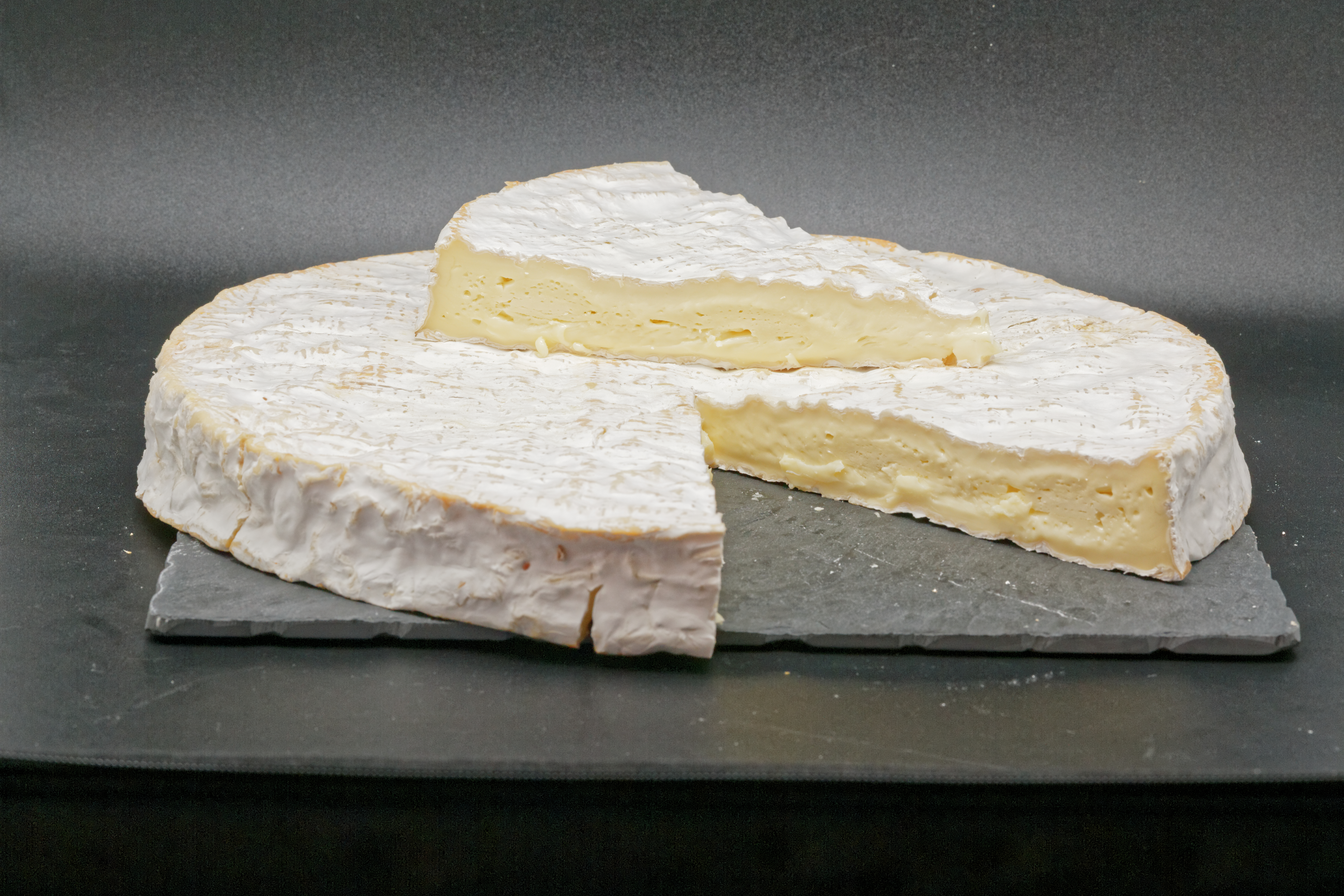 Le brie de Meaux est une appellation d'origine désignant un fromage au lait cru de la région de la Brie